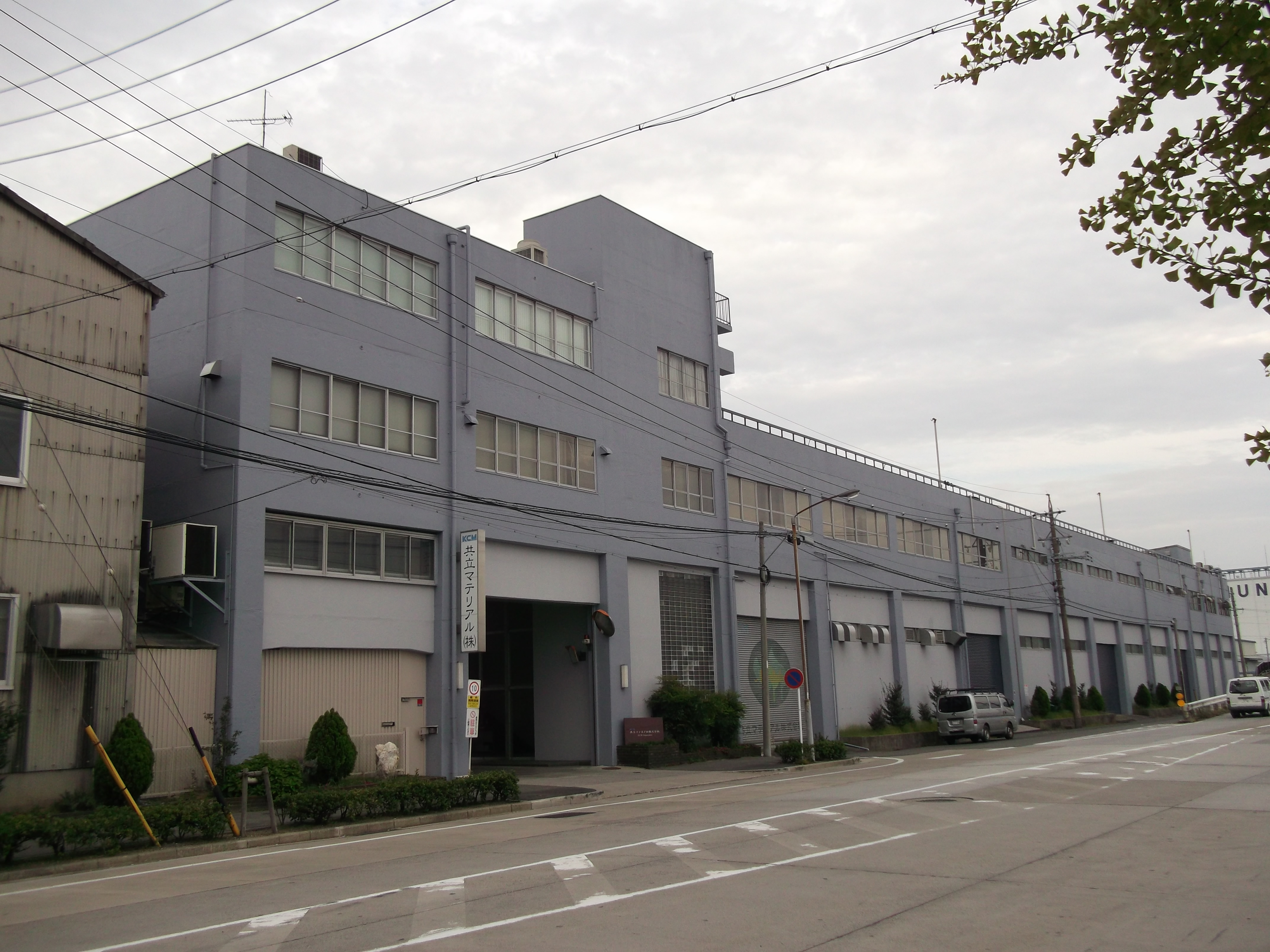 名古屋市港区築三町の共立マテリアル本社を西側公道北側より撮影